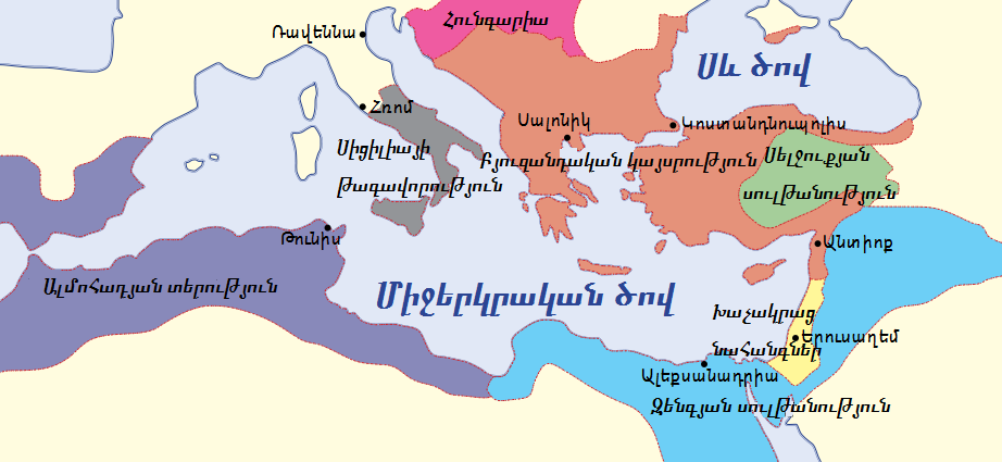 Բյուզանդական տերությունը 1180 թվականին